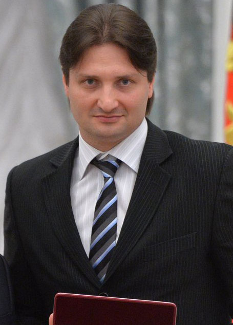 Эдгард Запашный